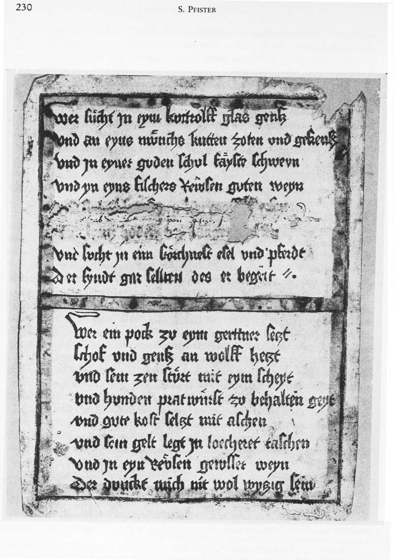 Xylographischer Druck mit 2 Priameln, Sammlung Schäfer Schweinfurt